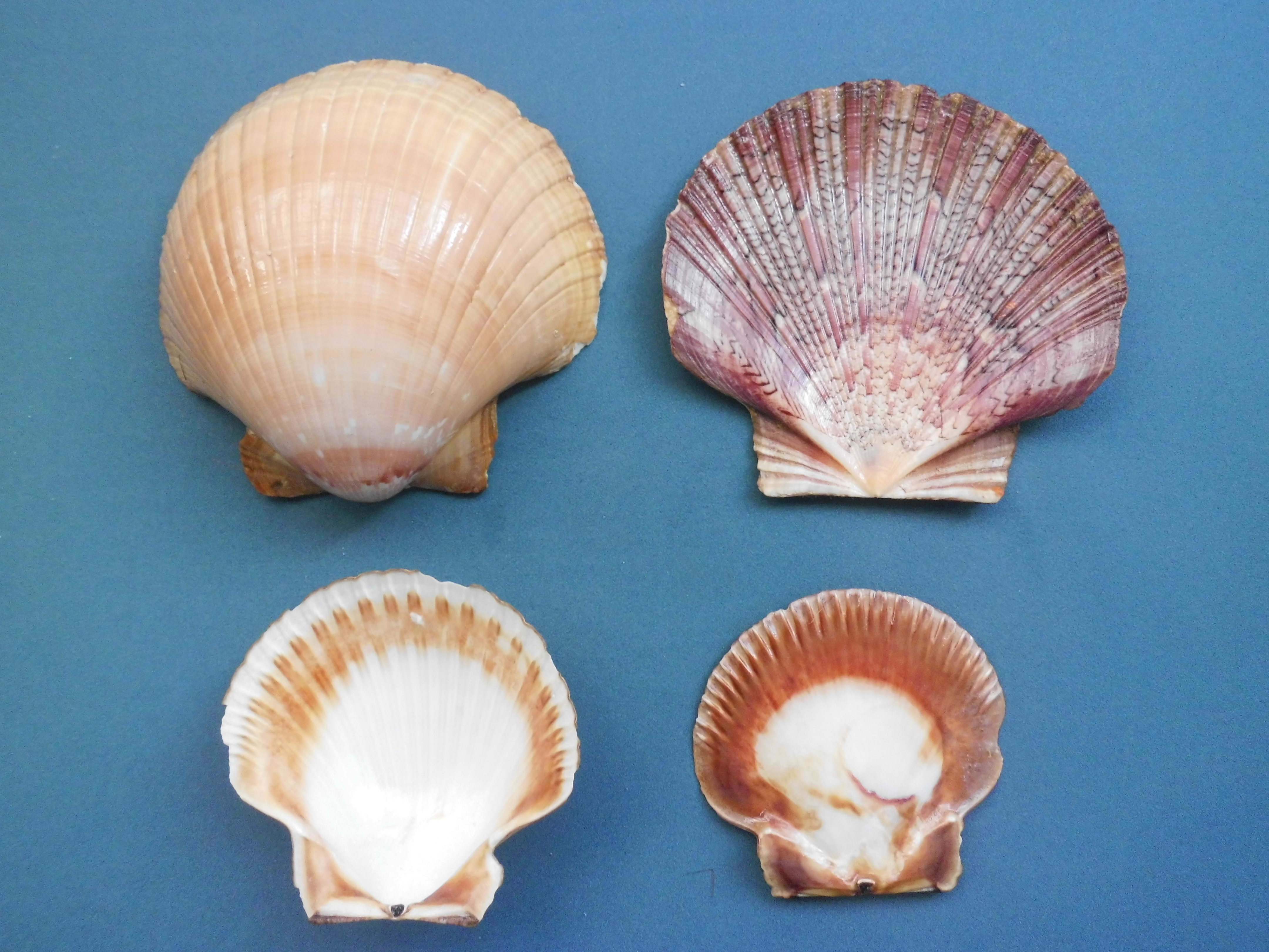 Euvola ziczac (Linnaeus, 1758) colectado en 2002 en cayo Bubi Archipiélago Las Aves, Dependencias Federales - Venezuela